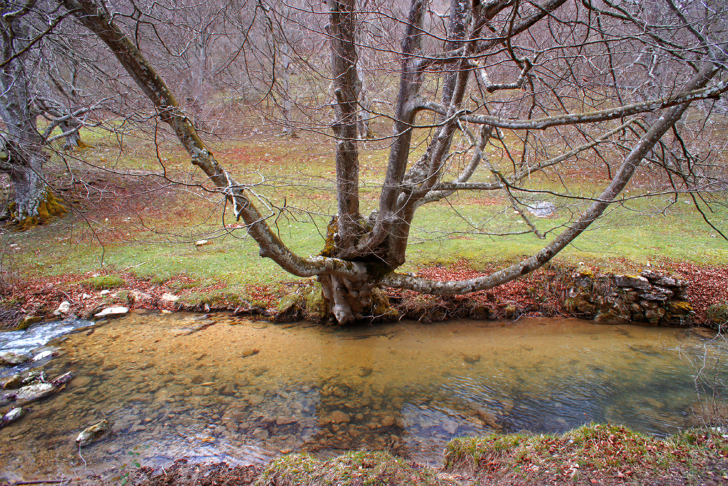 Arabako Ihuda ibaia